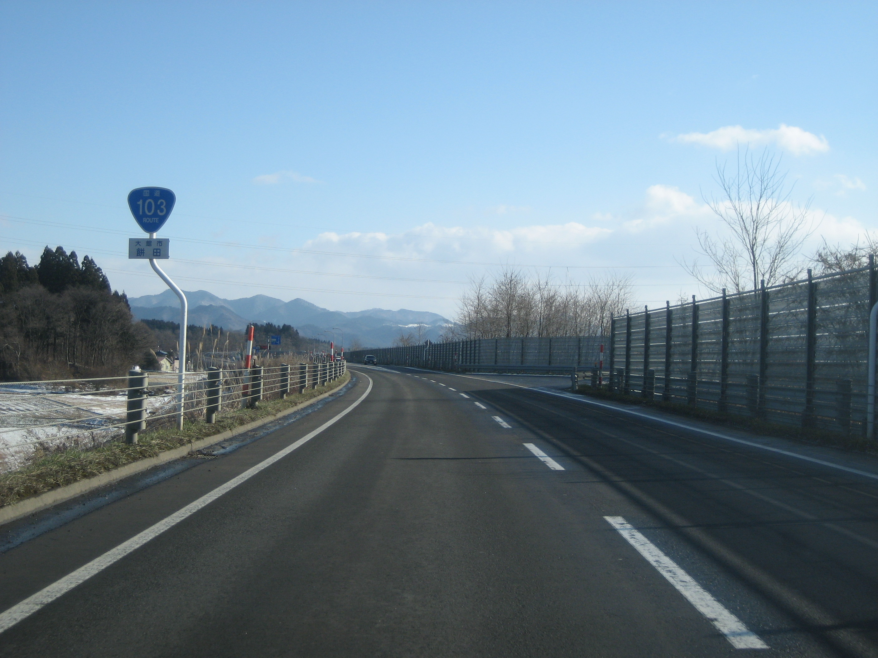 国道103号線大館南バイパス秋田県大館市餅田付近（比内方面を撮影）